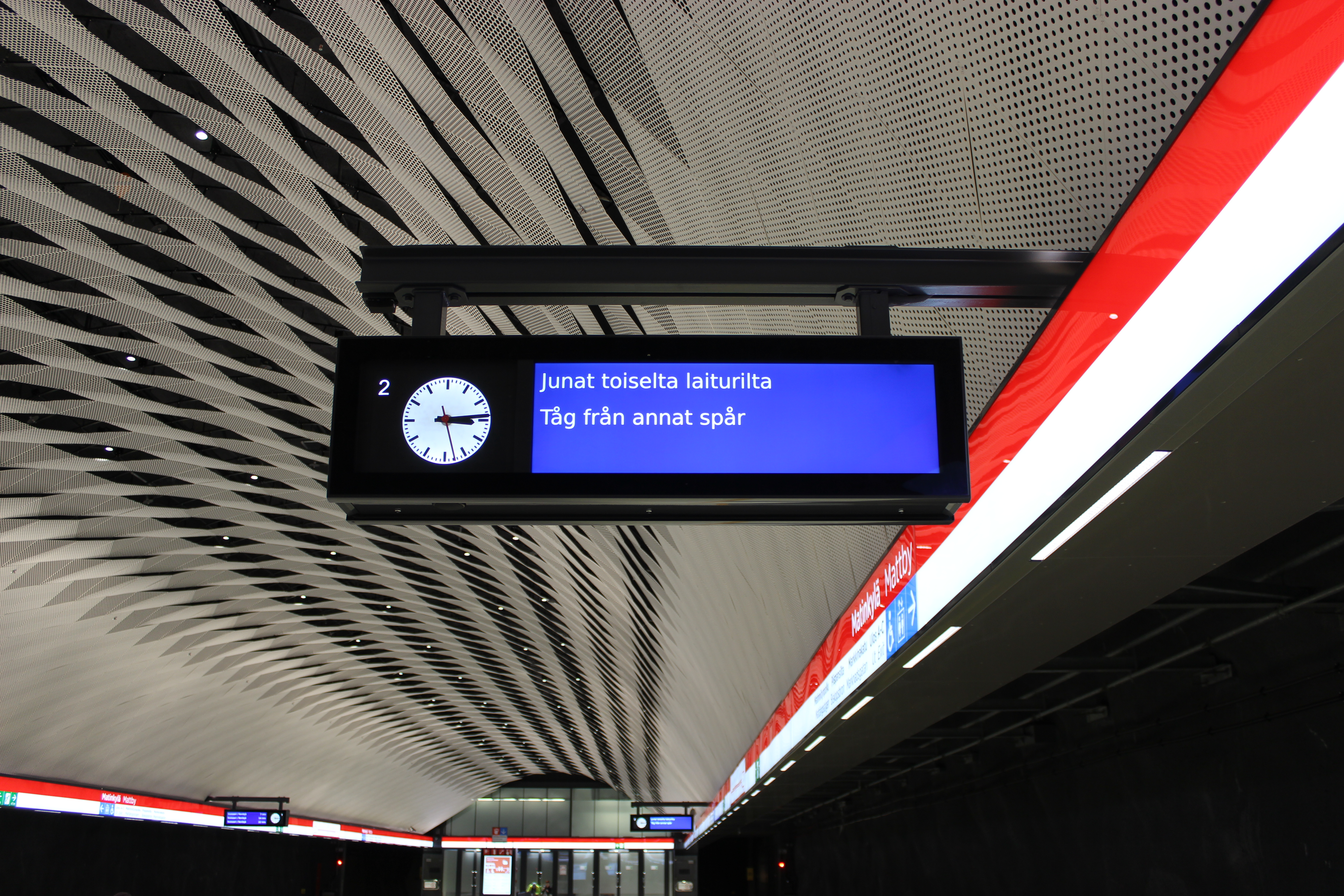 Laiturinäyttö Matinkylän metroasemalla marraskuussa 2017.